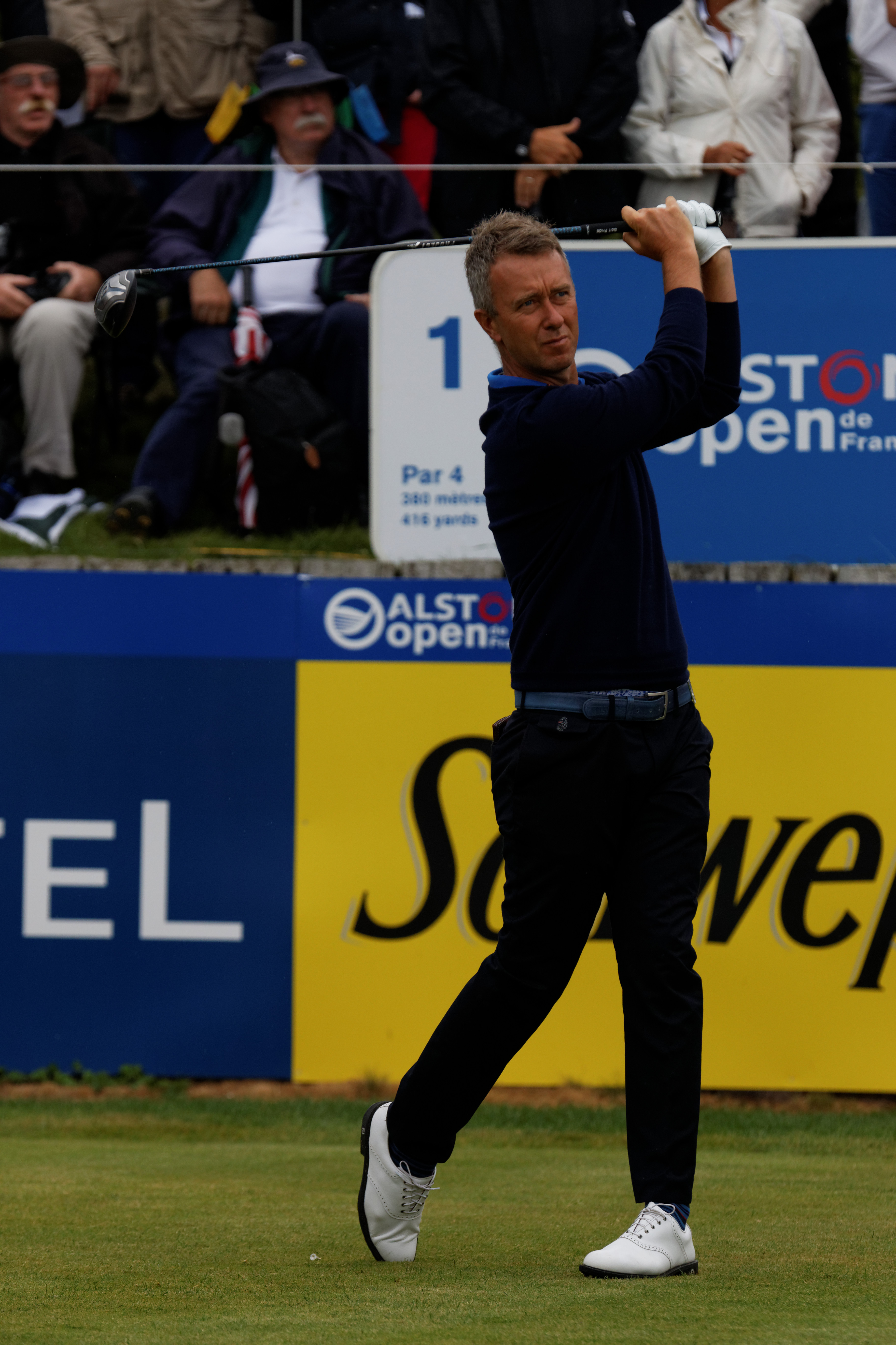 Mark Foster lors du quatrième tour de l'Open de France 2014 - Golf National - Saint-Quentin-en-Yvelines (78) - départ du trou n° 1